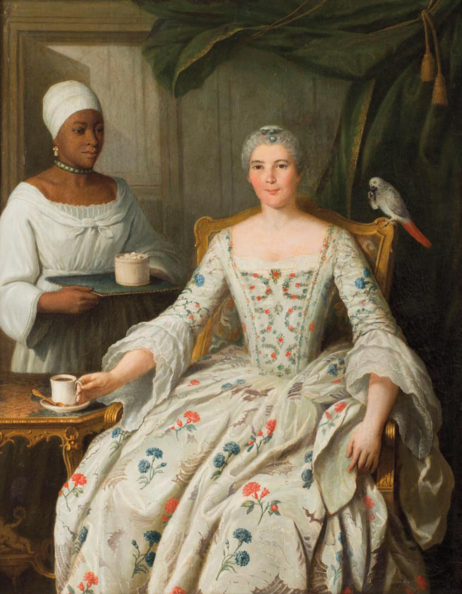 Portrait de Marguerite-Urbane Deurbroucq née Sengstack (1715-1784). Peints en 1753 par Pierre-Bernard Morlot